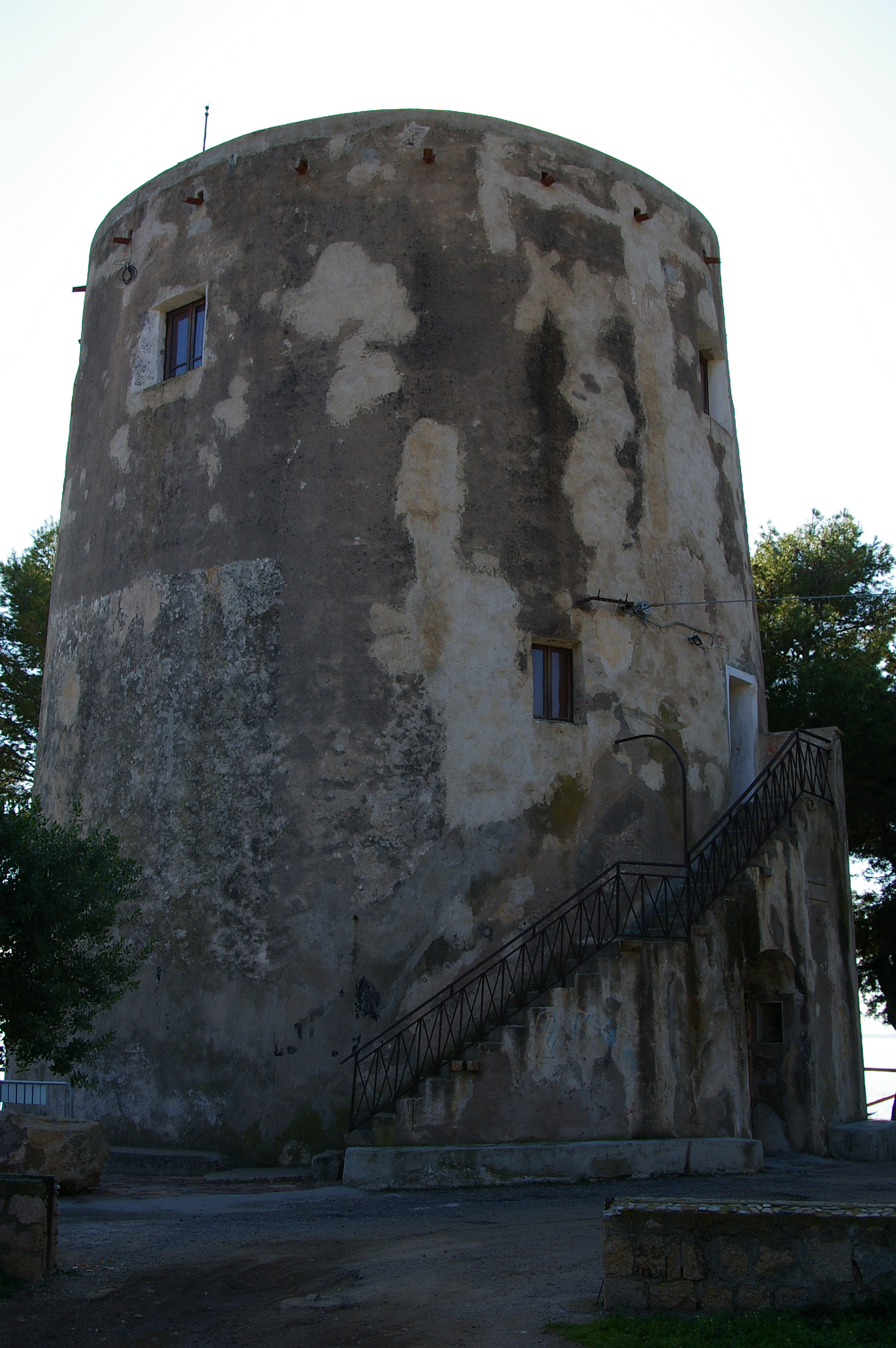 Torre di Santa Maria Navarrese, Santa Maria Navarrese; Baunei; Ostküste Sardinien